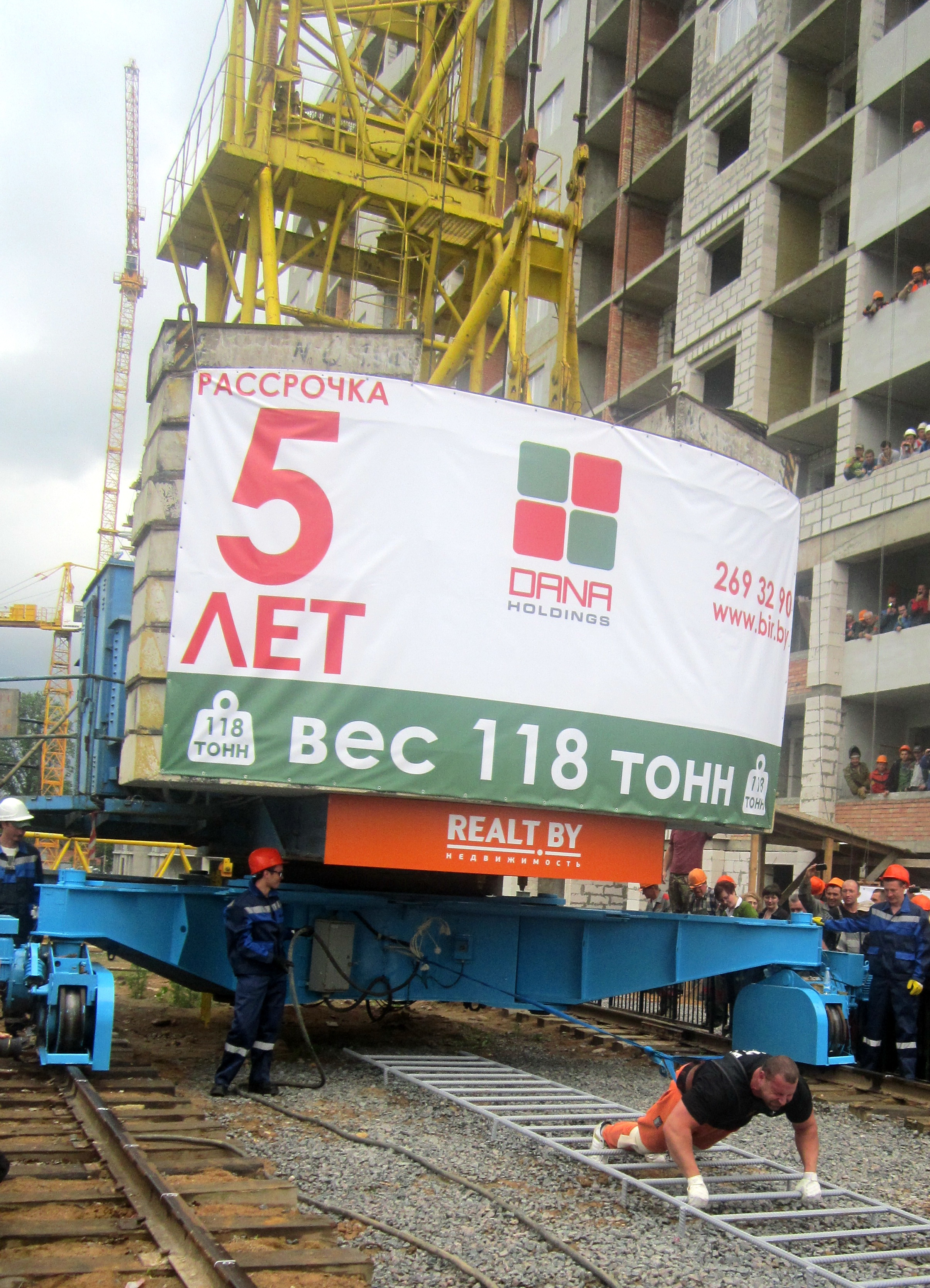 Установление белорууским стронгменом Кириллом Шимко нового рекорда для "Книги рекордов Гиннесса" с башенным краном. Минск, 2015